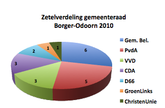 Borger-Odoorn zetelverdeling na gemeenteraadsverkiezingen 2010